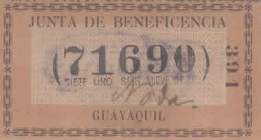 Boleto del sorteo 391 de la Lotería de Guayaquil